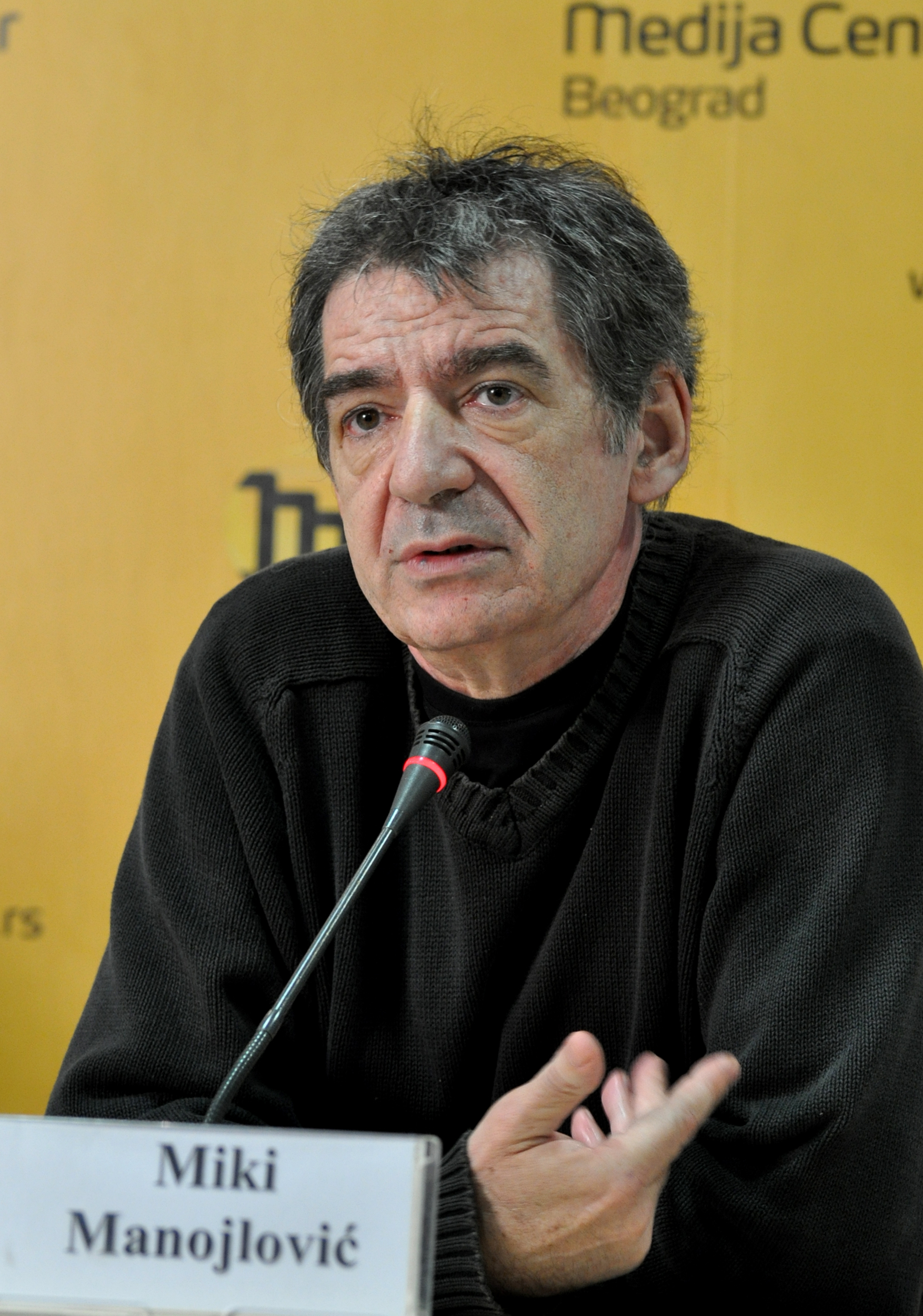 Мики Манојловић српски глумац